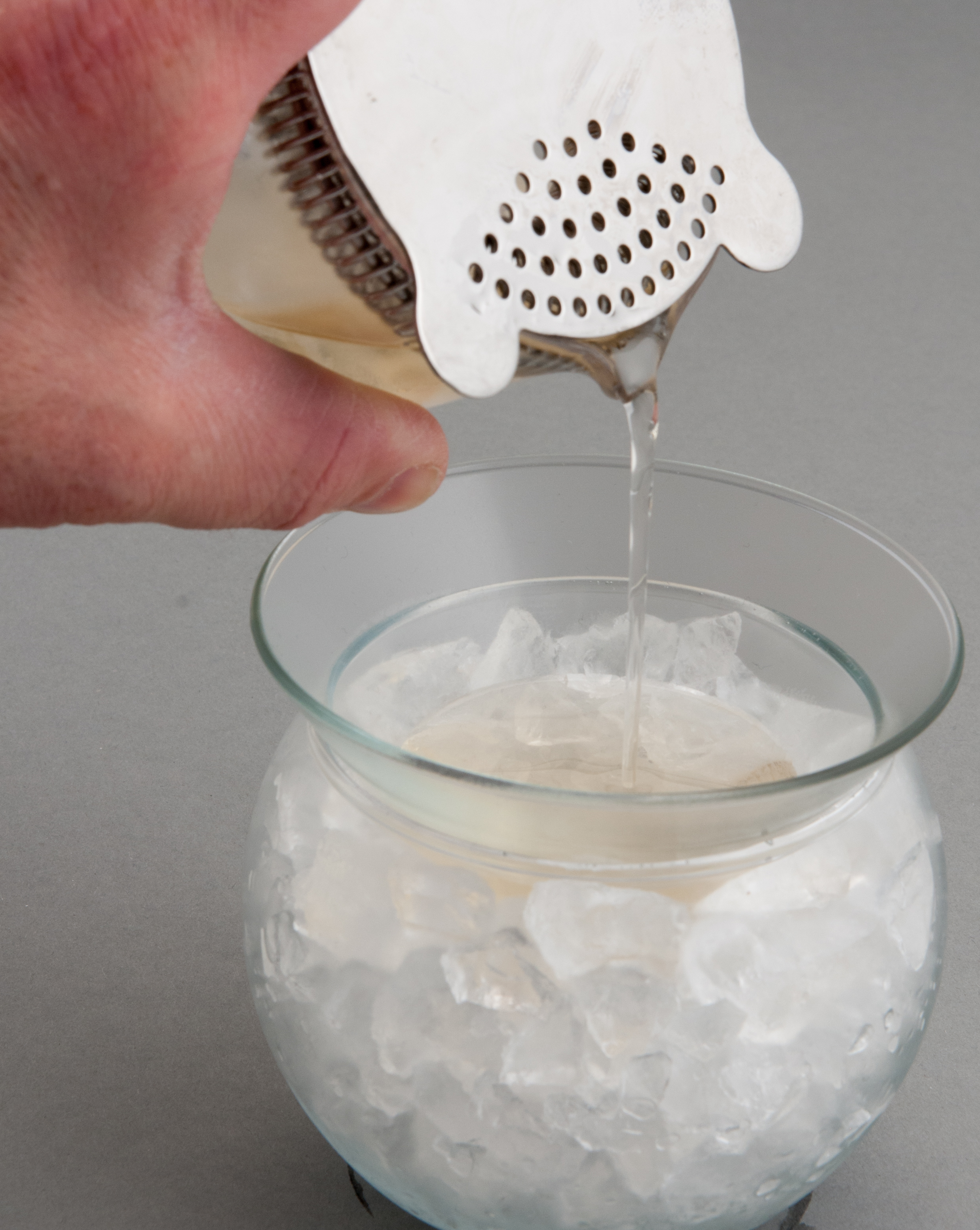 Martini